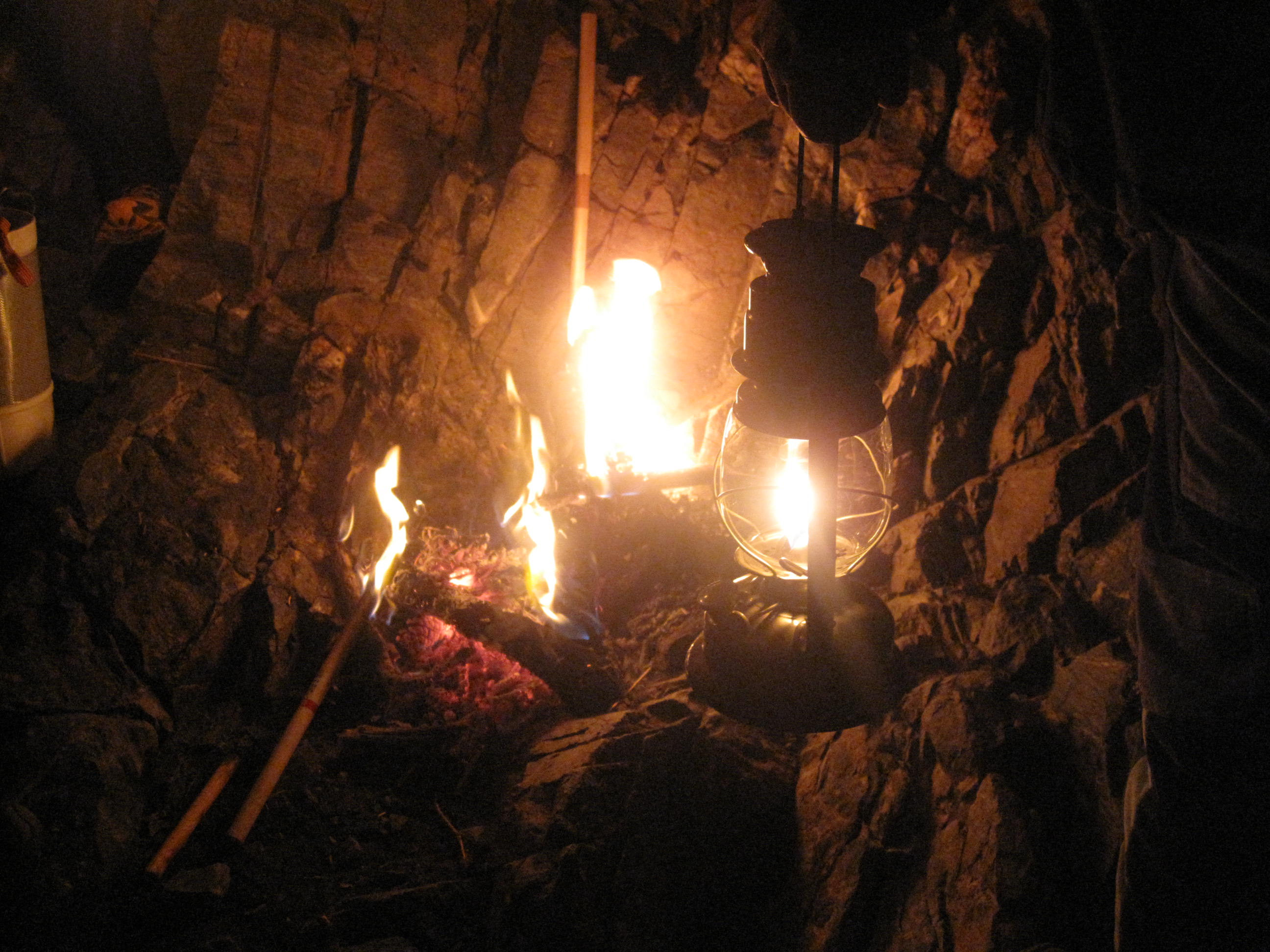 Encesa de la Flama el passat any 2012 al cim de la muntanya del Canigó.